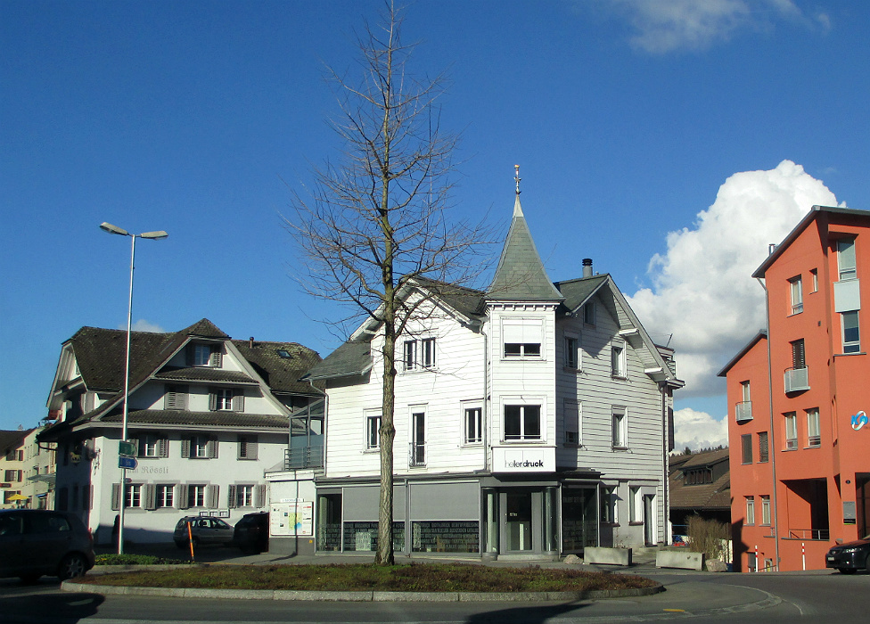 Dorfkern von Cham ZG